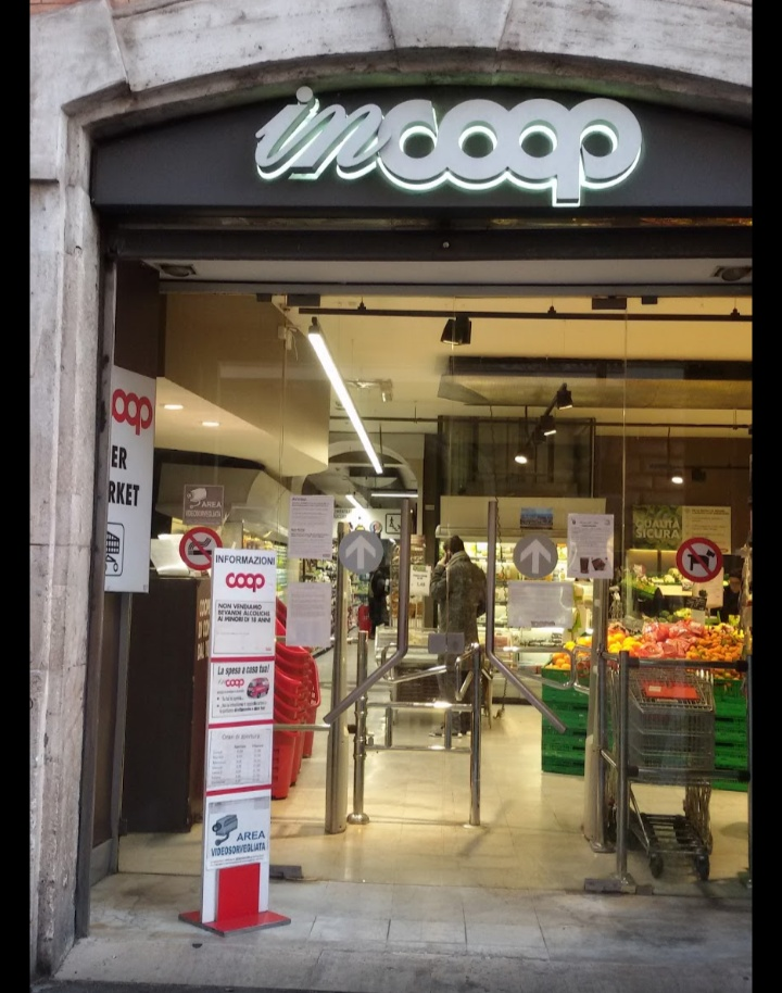 Supermercado donde aparece un cartel donde no se permiten Mascotas